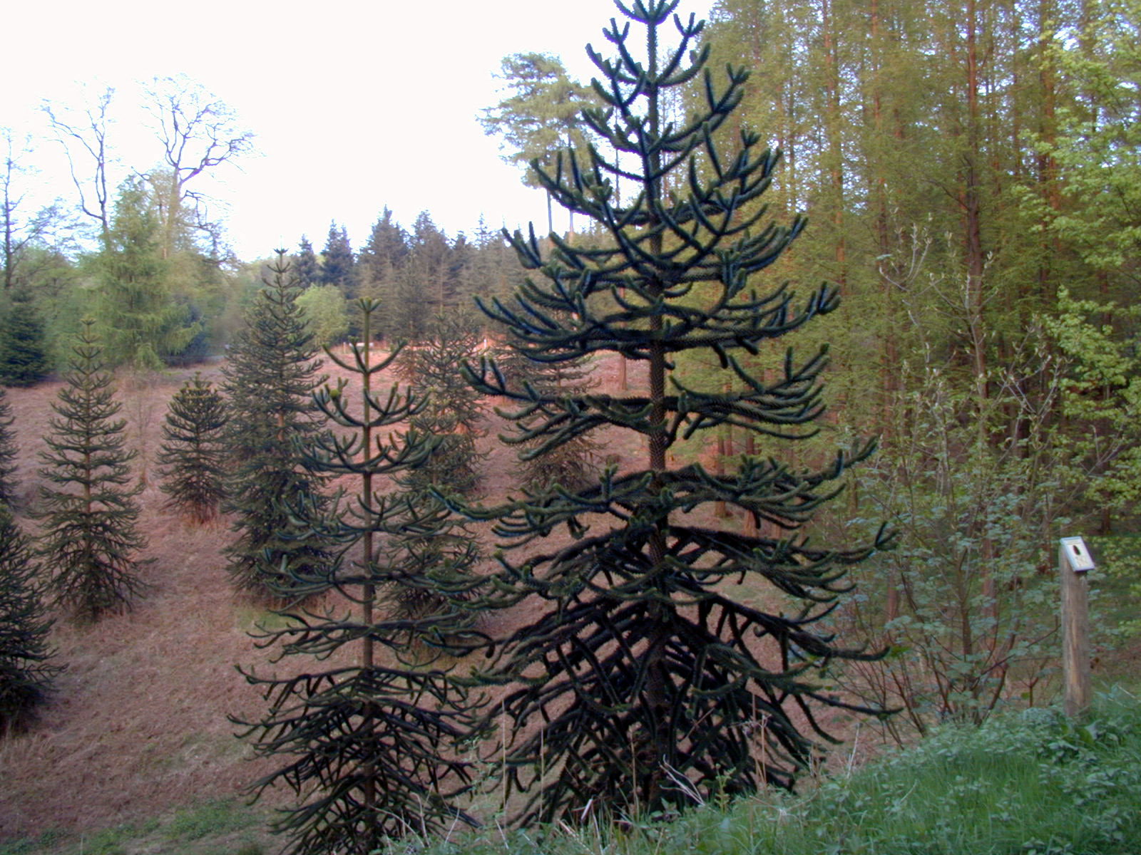 Exotenwald im Staatsforst Burgholz mit Araucaria araucana, Wuppertal